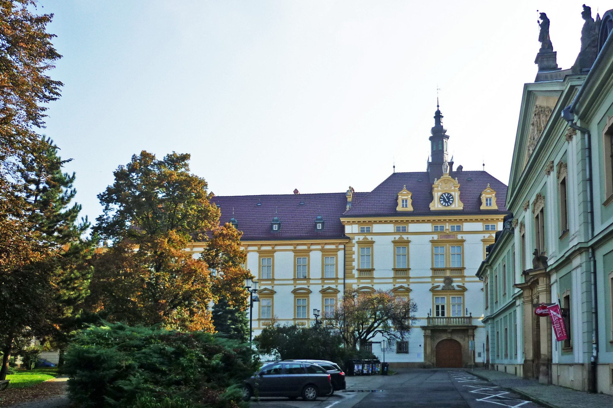 Erzbischofs-Palais in Olmütz (Olomouc) in Mähren